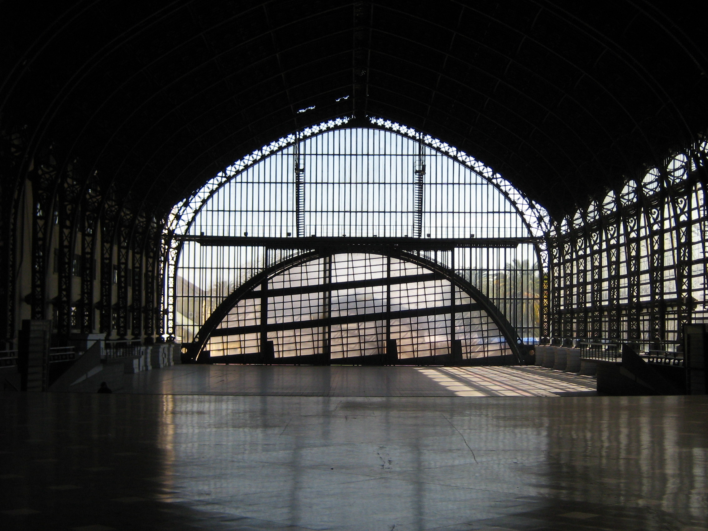 Vista hacia el interior de la Estación Mapocho This is a photo of a national monument in Chile: 831